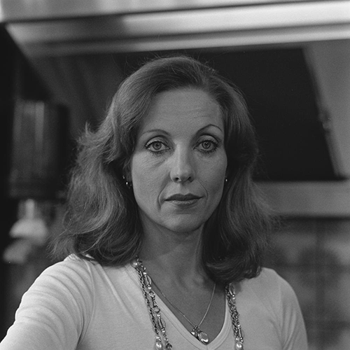 Carry Tefsen als Thea in aflevering Het eindexamen van de Nederlandse dramaserie De Lemmings in 1980